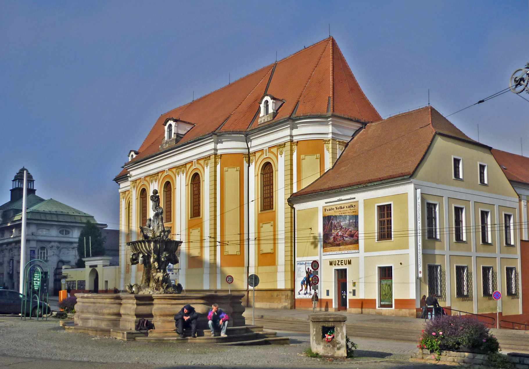 Clarakirche in Olmütz (Olomouc) in Mähren